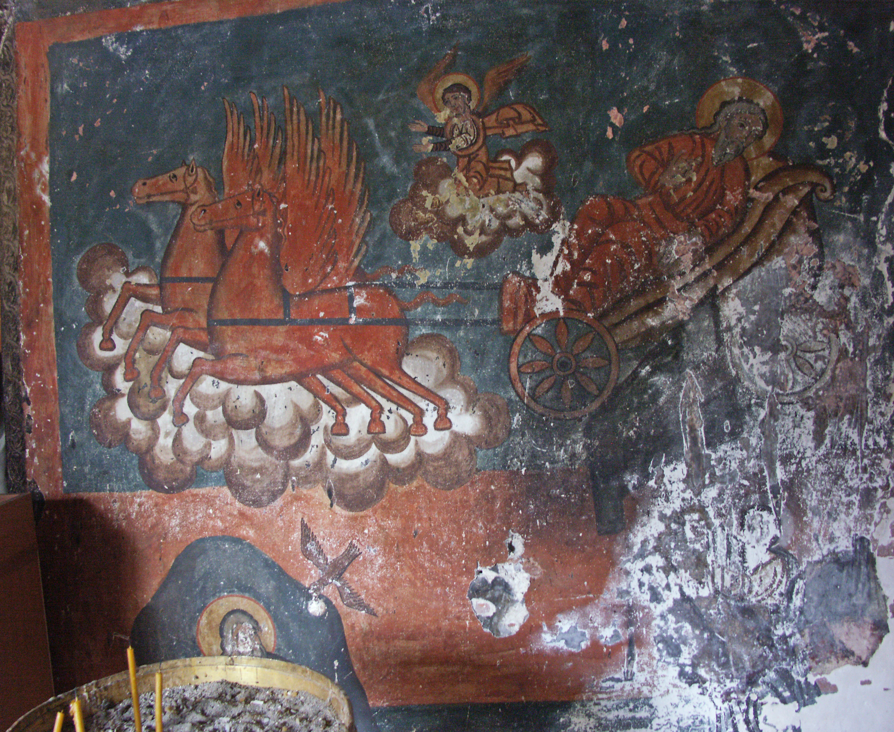 Le prophète Elie emporté au ciel sur un char.